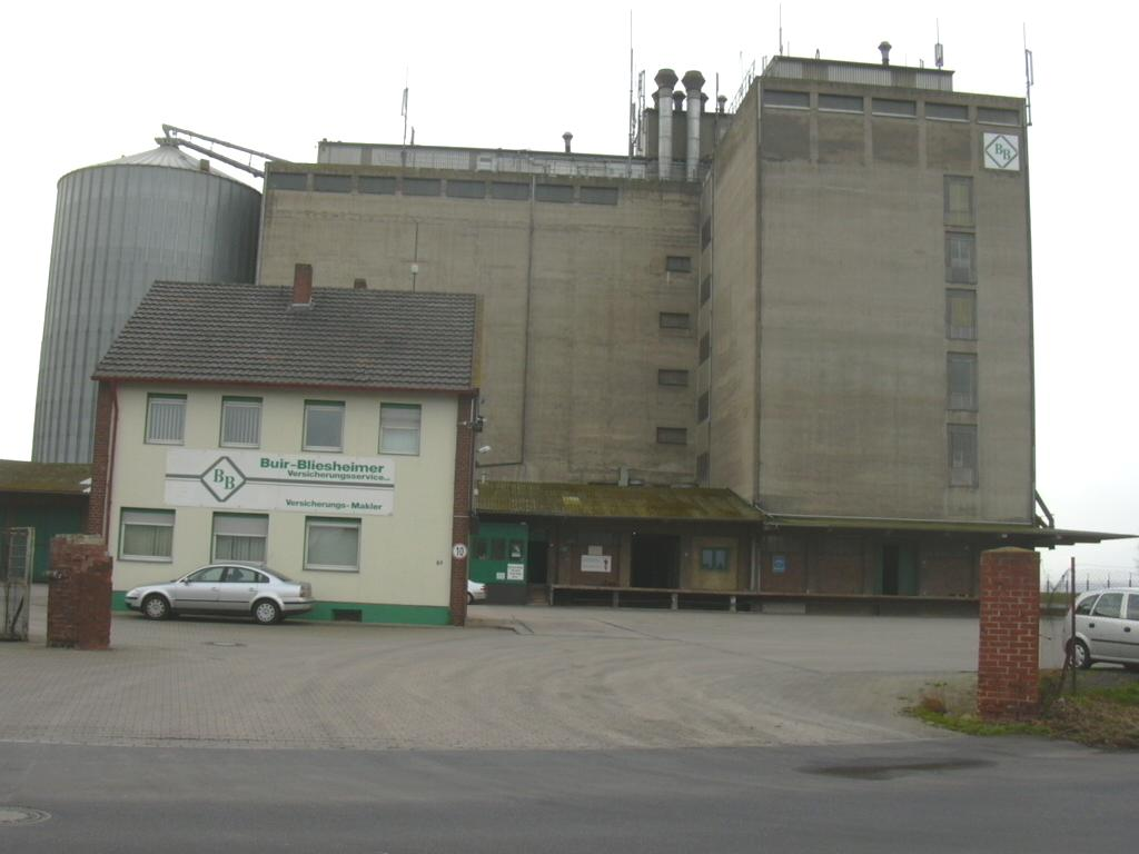 Buir-Bliesheimer Genossenschaft, Lager Nörvenich own work, papa1234 2006-02-28